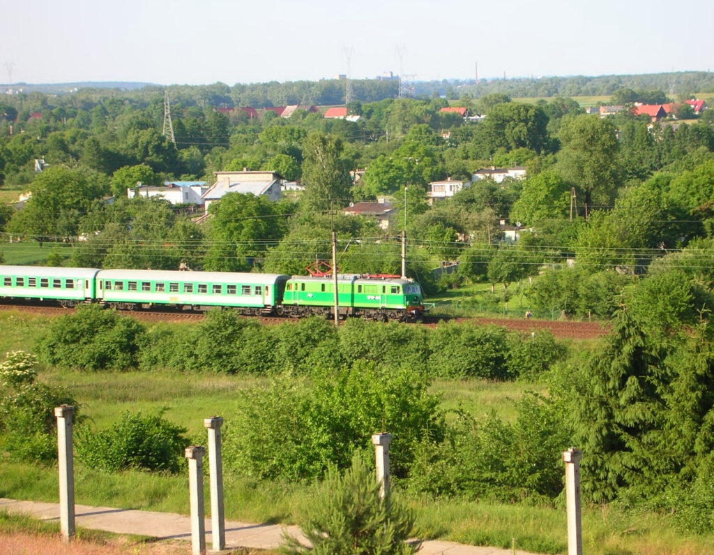 Widok ze Zbocza Łęgnowskiego, linia kolejowa nr 18 Bydgoszcz-Tpruń